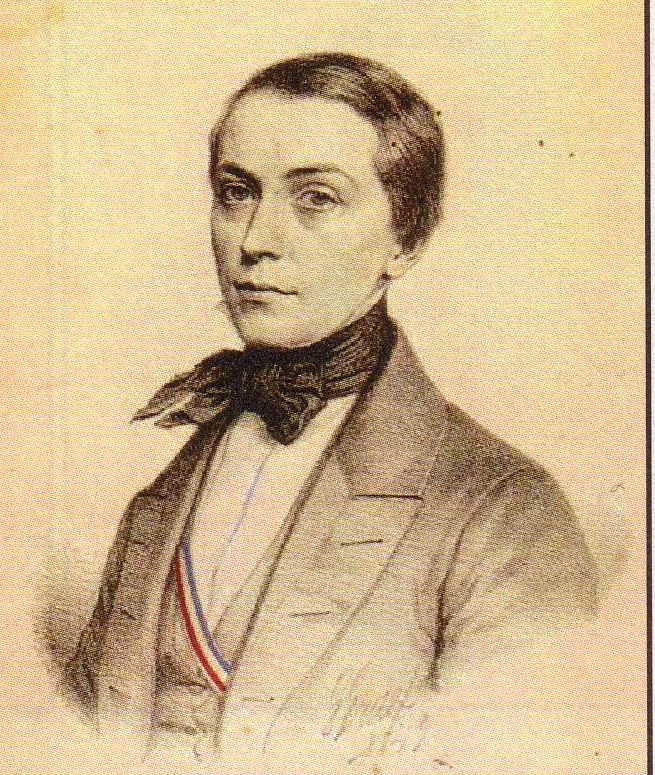 Lithographie von Wilhelm Friedrich Adolf von Popowski (1825-1880) als Theologiestudent und Angehöriger des Corps Masovia in Königsberg.